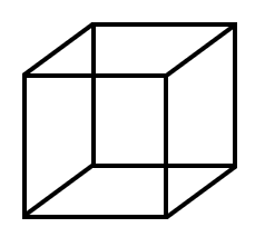 Necker-Würfel